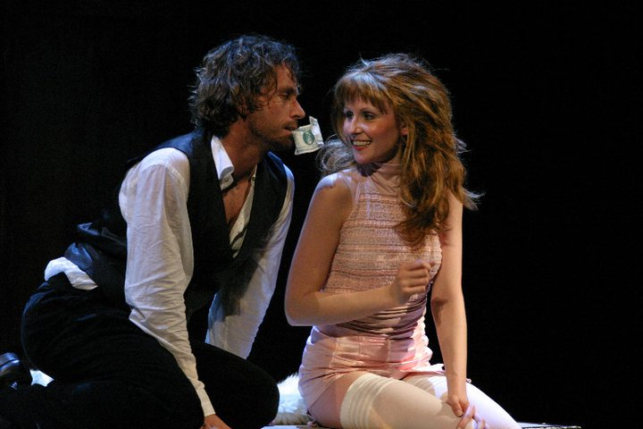 Snímek z inscenace Miláček autora Guye de Maupassanta. Na snímku Petr Mikeska a Petra Nakládalová